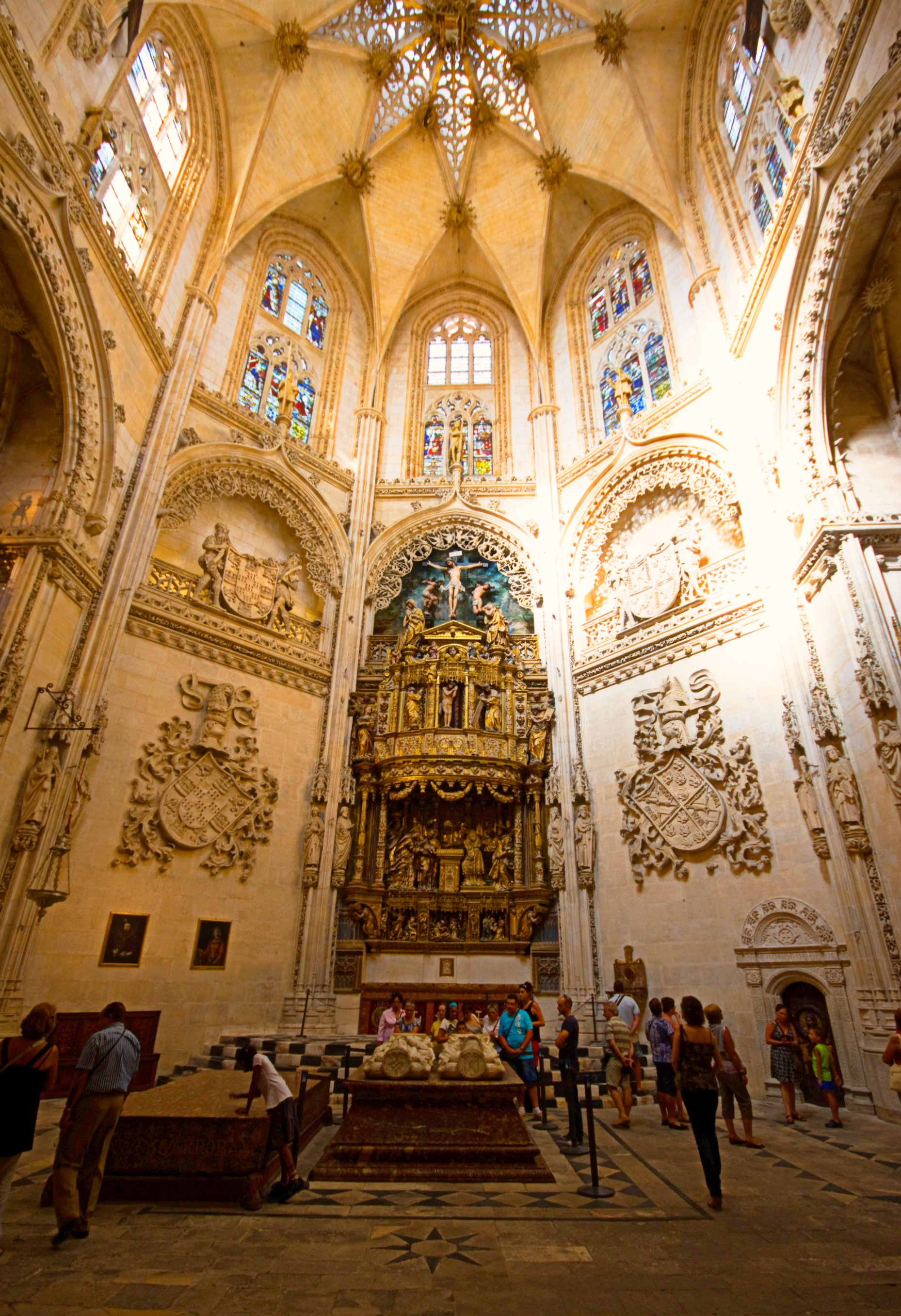 Ver mas fotos de Burgos aqui : Capilla de los Condestables.Catedral de Burgos Edificada sobre la capilla central de la girola, sustituye a la primitiva capilla gótica dedicada a San Pedro. La nueva gran capilla fue encargada por los Condestables de Castilla Pedro Fernández de Velasco y Mencía de Mendoza y Figueroa para servir de panteón familiar y aunque su denominación popular sea la de Capilla del Condestable (o de los Condestables), su nombre exacto es Capilla de la Purificación de la Virgen, a la que estaba consagrada.